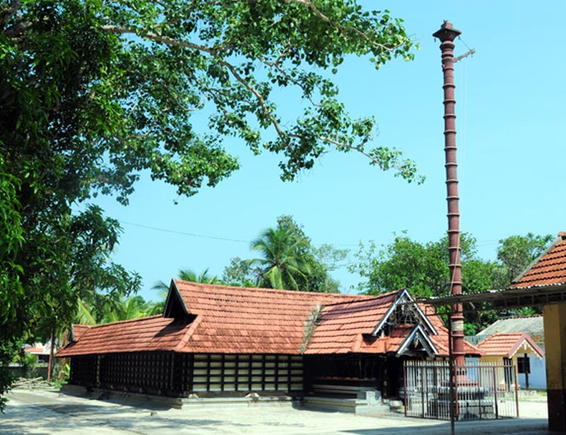 ക്ഷേത്രം